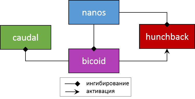 Схема взаимной регуляции генов дрозофилы (nanos, bicoid, hunchback и caudal), отвечающих за образование передне-задней оси в эмбриогенезе. Составлена на основе статьи "Материнский эффект", раздел "Примеры признаков, определяемых генами с материнским эффектом. Спецификация осей тела у дрозофилы. Образование передне-задней оси"